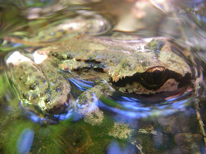 Ascaphus truei